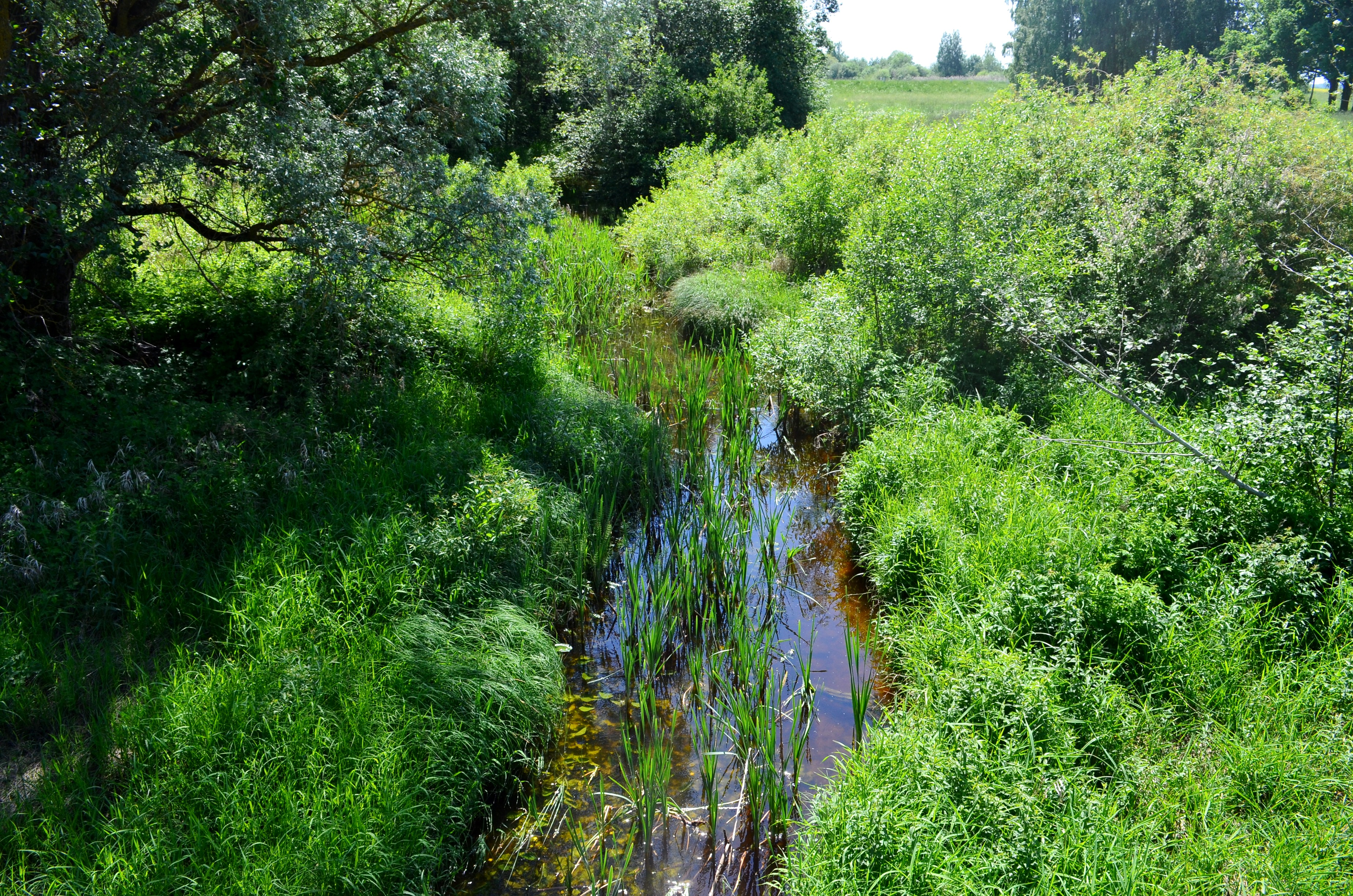 Vilkijos upė už Skaistgirio, Joniškio raj.